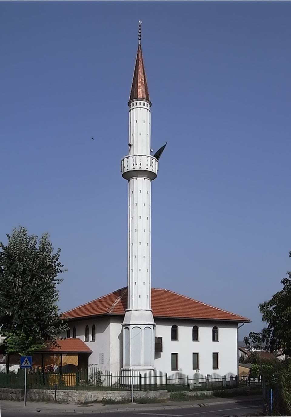 Banja Luka, Sefer-Beg-Moschee an der Omladinska-Straße.